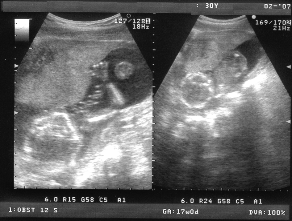 Ecografía (scan) de un feto de 17 semanas. Realizada externamente, por encima de la tripa. En la parte izquierda se puede apreciar la cabeza, el brazo derecho, la espina dorsal y la rodilla derecha. En la parte derecha se muestra cabeza y cuerpo. El feto mide 227 mm y pesa 229 gramos.